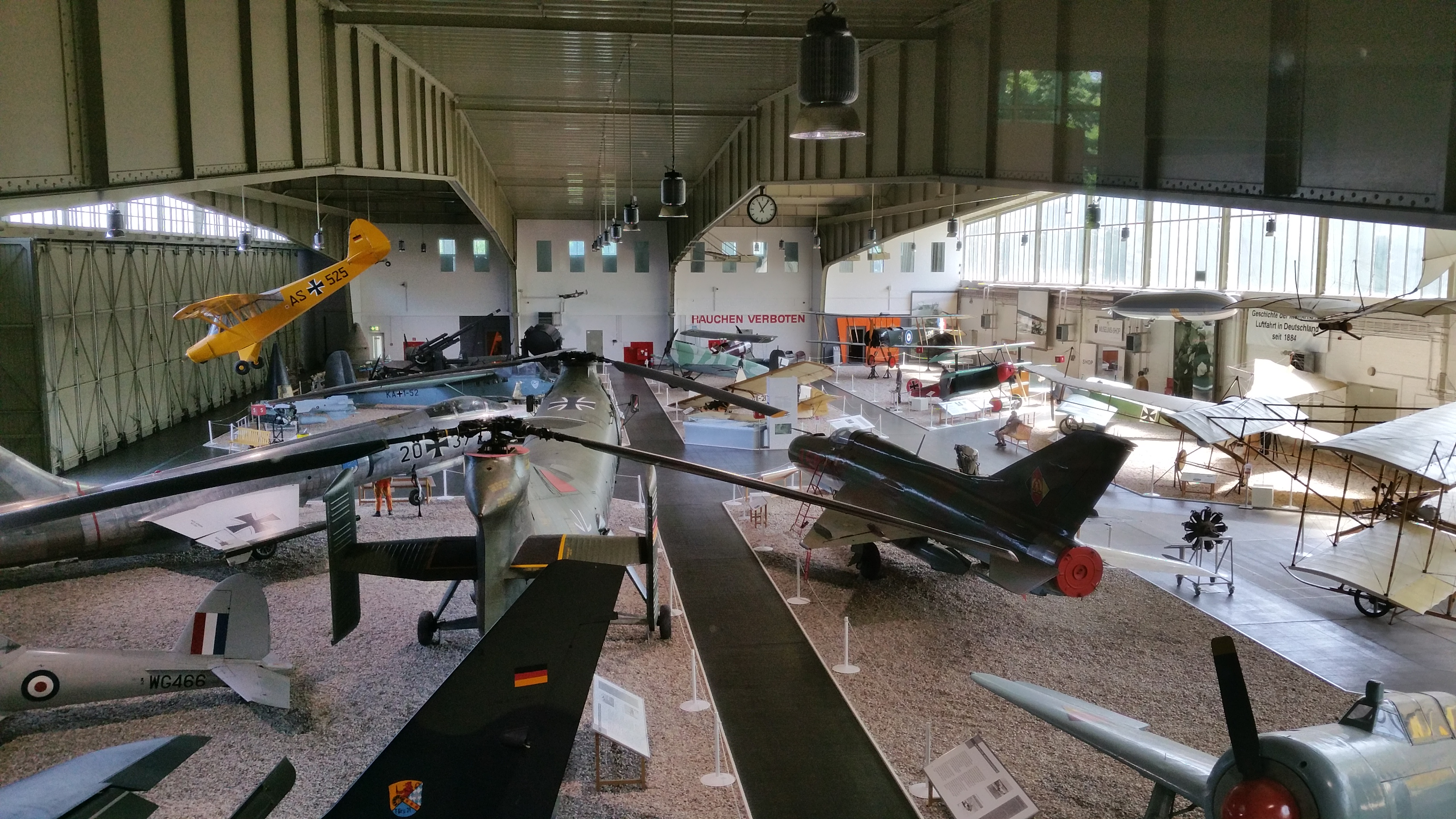 Blick in Hangar 3